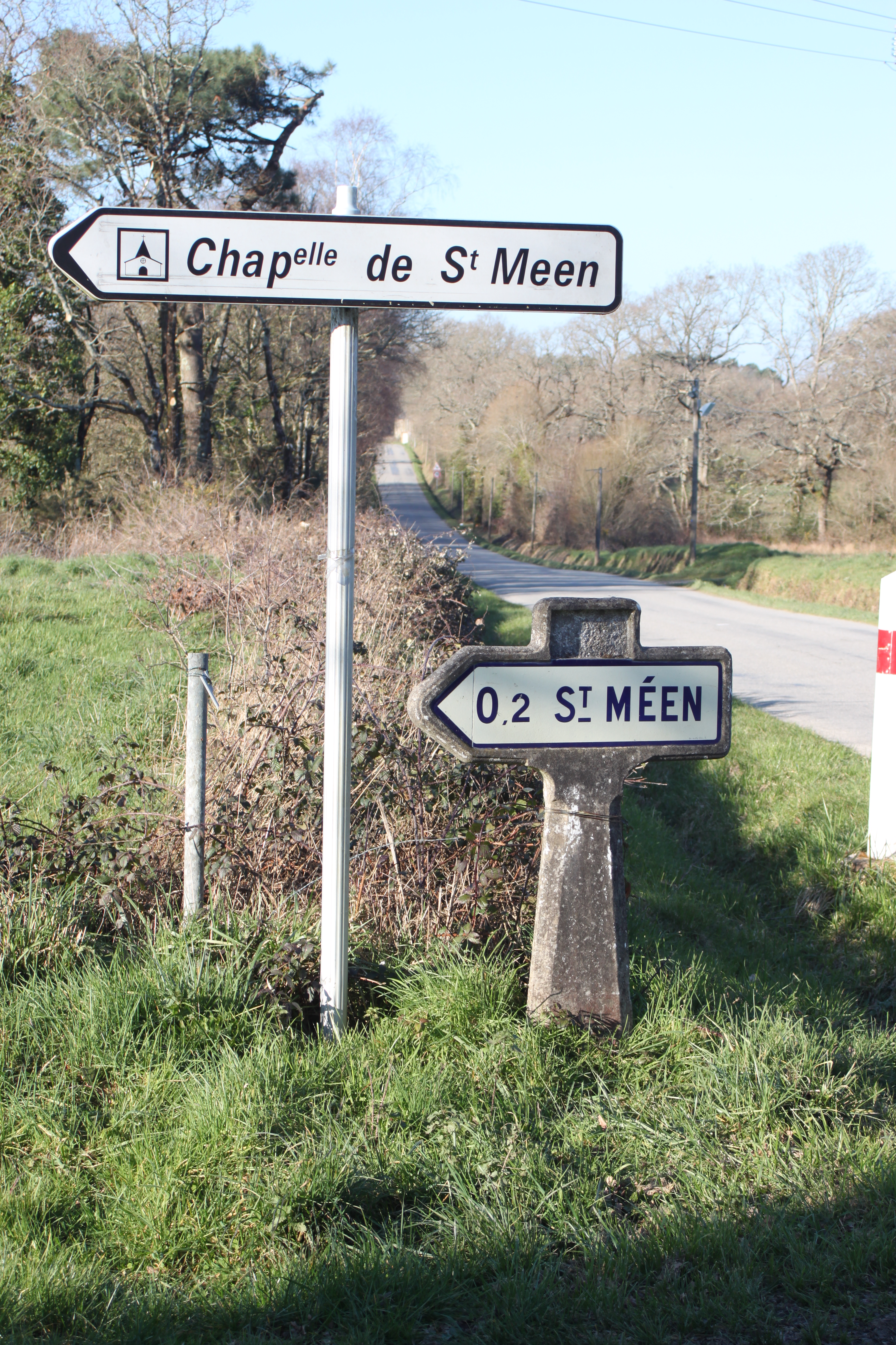 Panneau de direction du XIX° et son ancêtre du XX°, Saint-Méen, Fr-56-Ploemel.